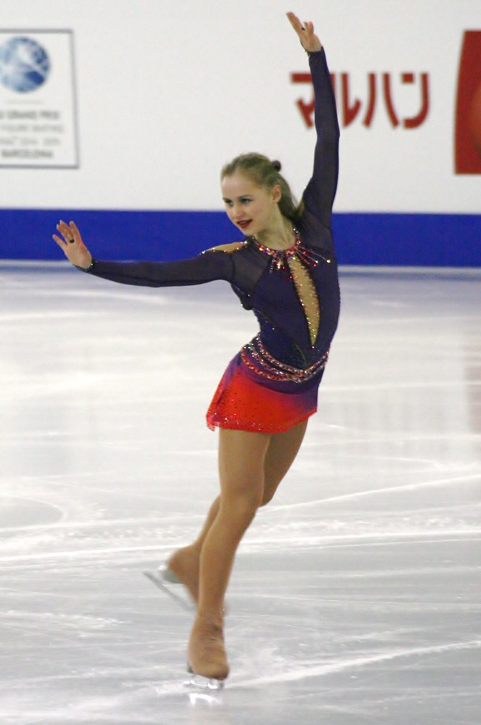 Серафима Саханович (Россия) на финале Гран-при среди юниоров сезона 2014-2015.